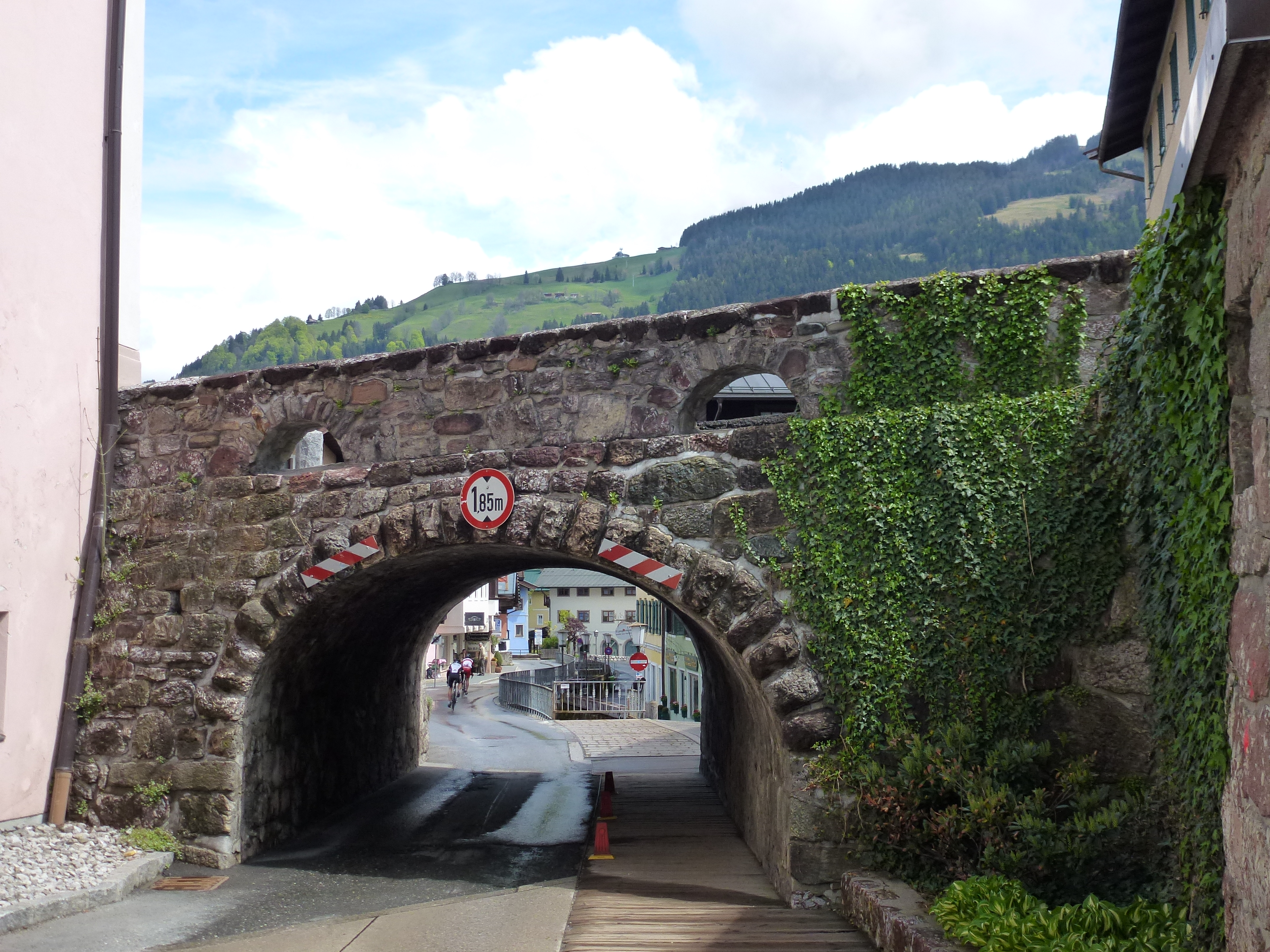 Brücke, Treppenanlage und WC - Untere Gänsbachgasse, Kitzbühel